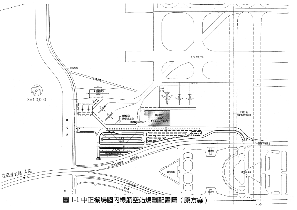 一張介紹臺灣桃園國際機場國內線航廈原始的規畫的圖片。